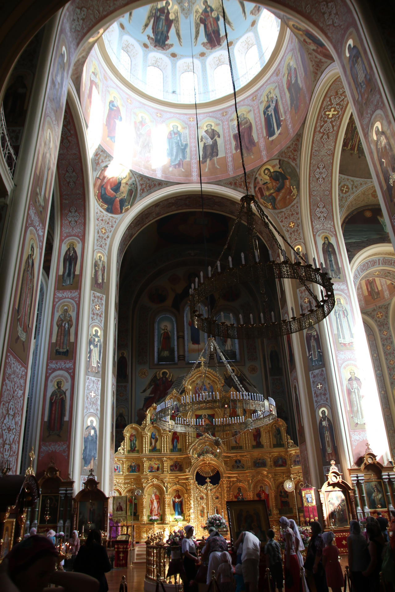 Екатерининский кафедральный собор с интерьером: улица Коммунаров, 52, Краснодар, Краснодарский край